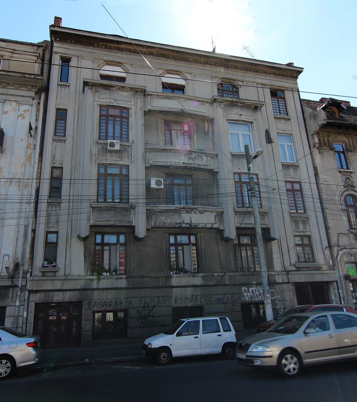 Imobil pe Calea Călărașilor